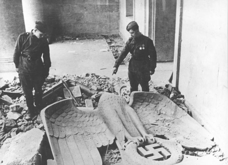 Berlin, Rotarmisten in der Reichskanzlei ADN-ZB/SNB II. Weltkrieg 1939-45 Die erbitterten Kämpfe um Berlin sind am 2. Mai 1945 beendet. Die Rote Armee hat gesiegt. Zwei Rotarmisten in der Neuen Reichskanzlei in der Voßstraße, zu ihren Füßen das Symbol der faschistischen Macht, der Adler mit dem Hakenkreuz. 3629-49